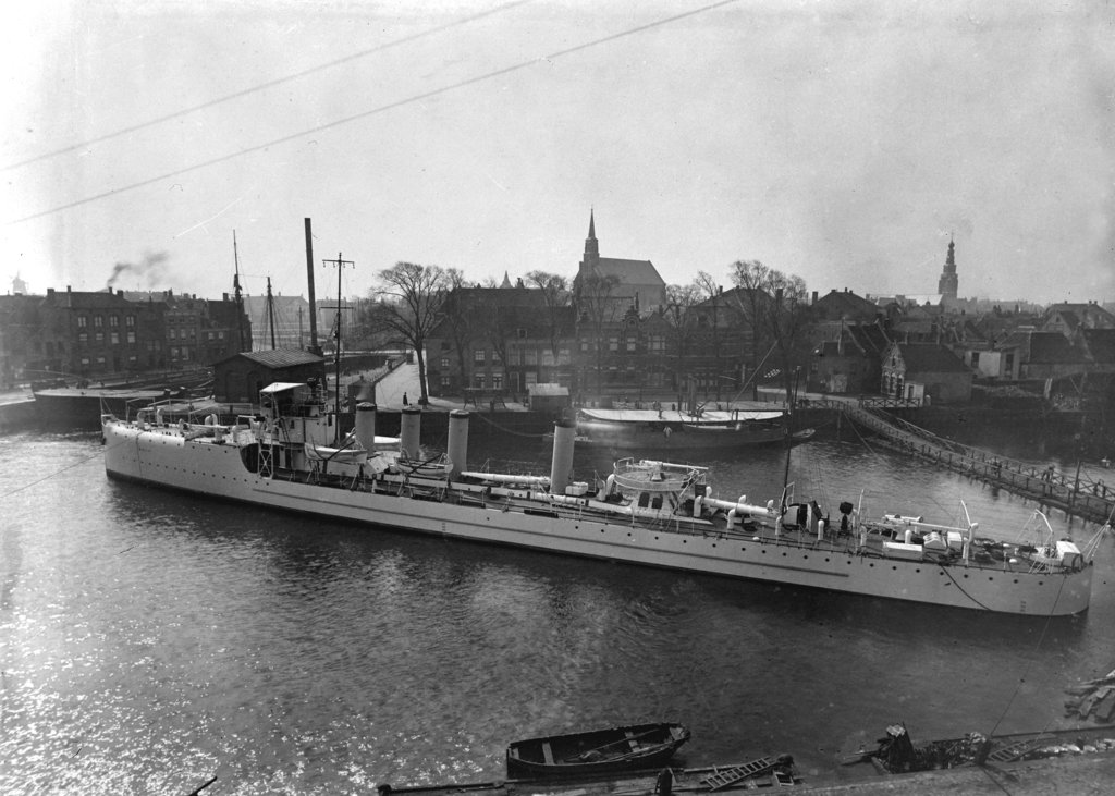 Hr.Ms. Wolf (1910-1922) afgemeerd in een haven Hr.Ms. Wolf (1910-1922) moored in a harbor